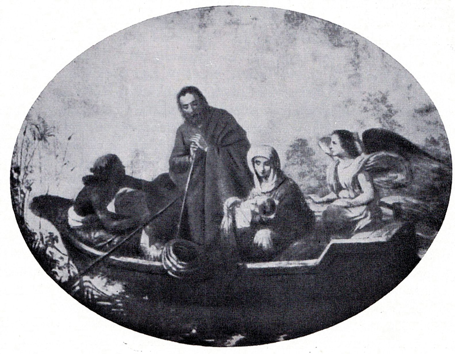 Fuga din Egipt - Mănăstirea Agapia - copie după Auguste Chauvin